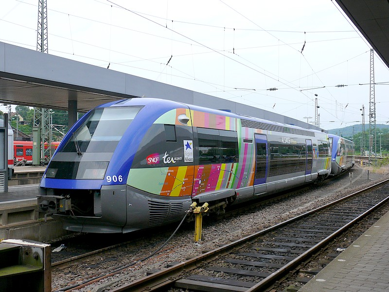 X 73900 en livrée TER Alsace en gare de Sarrebruck